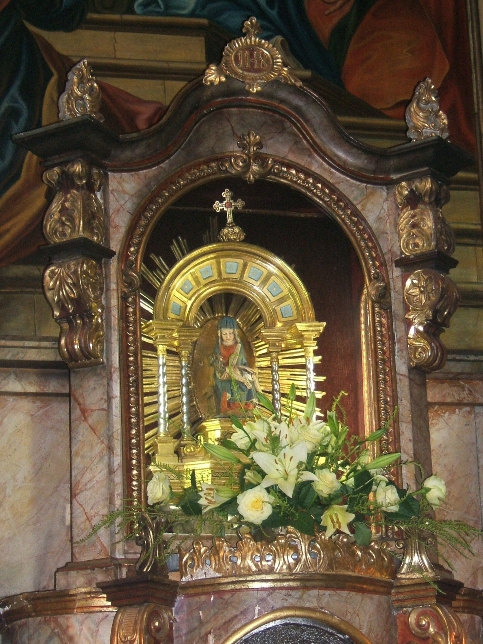 Gnadenbild aus dem 13. Jahrhundert im linken Seitenaltar der Klosterkirche Mariabuchen.